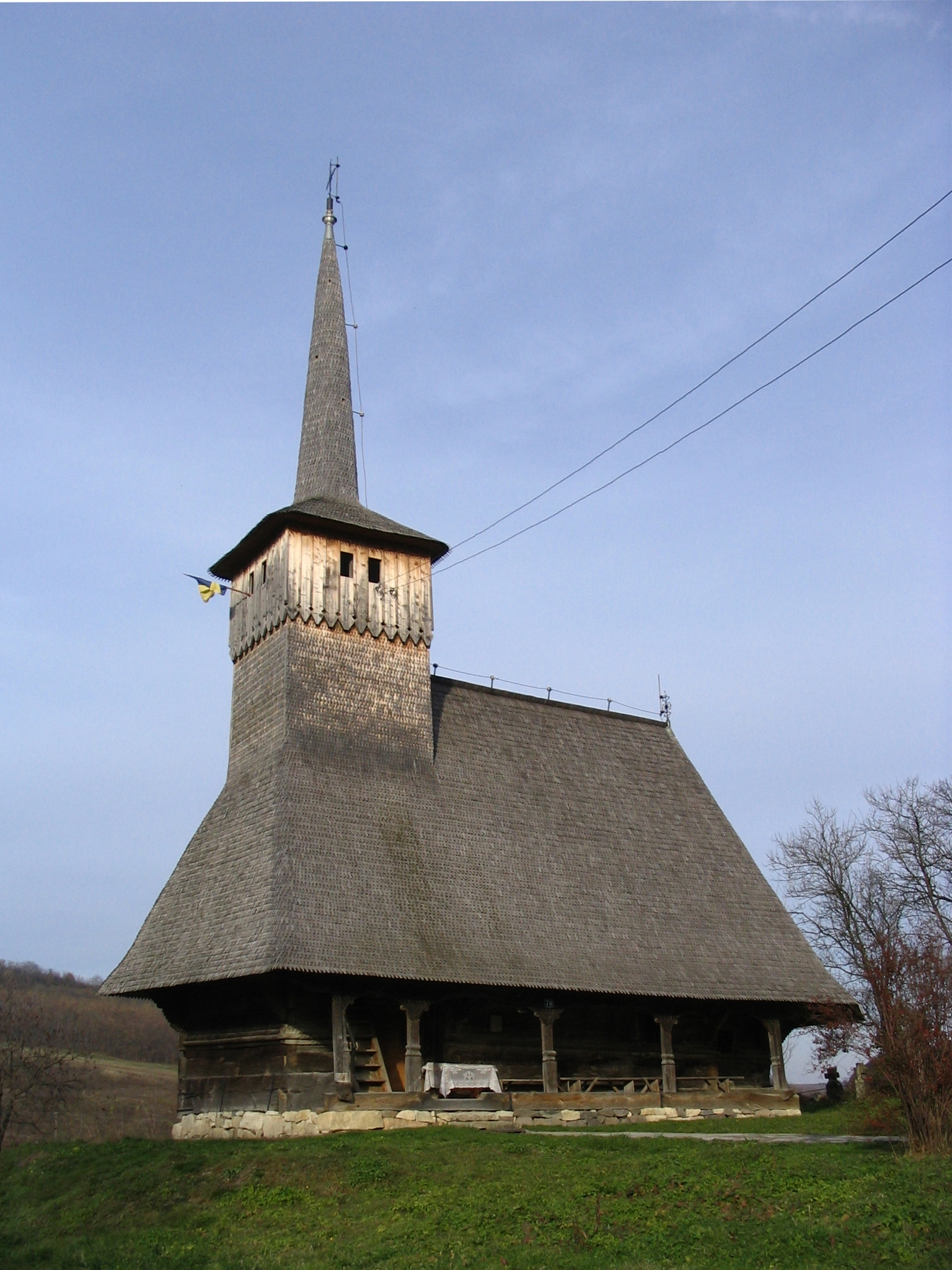 Biserica de lemn din Horoatu Cehului, Sălaj. Autor: Bogdan Ilieş Data: noiembrie 2005